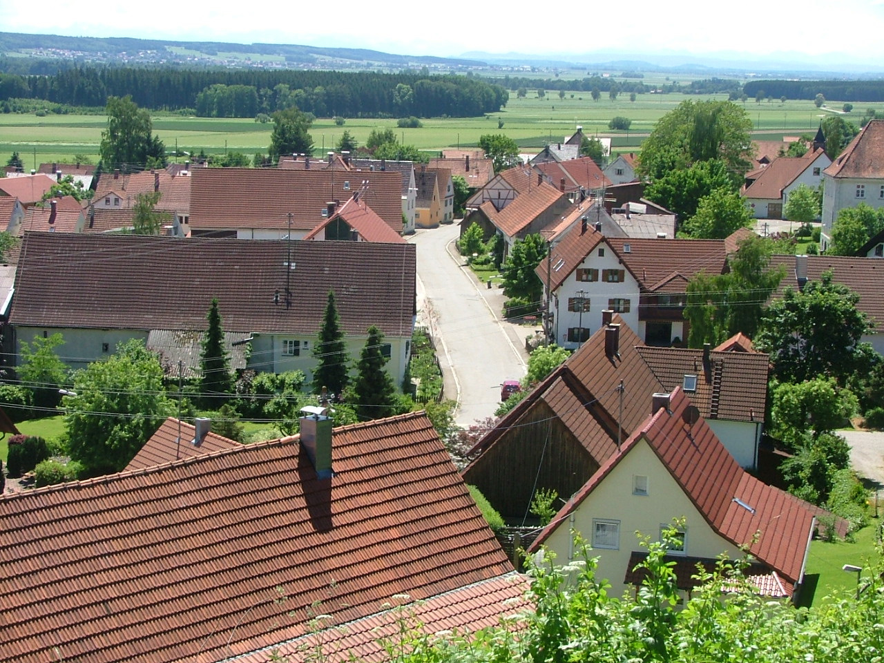 Osterberg